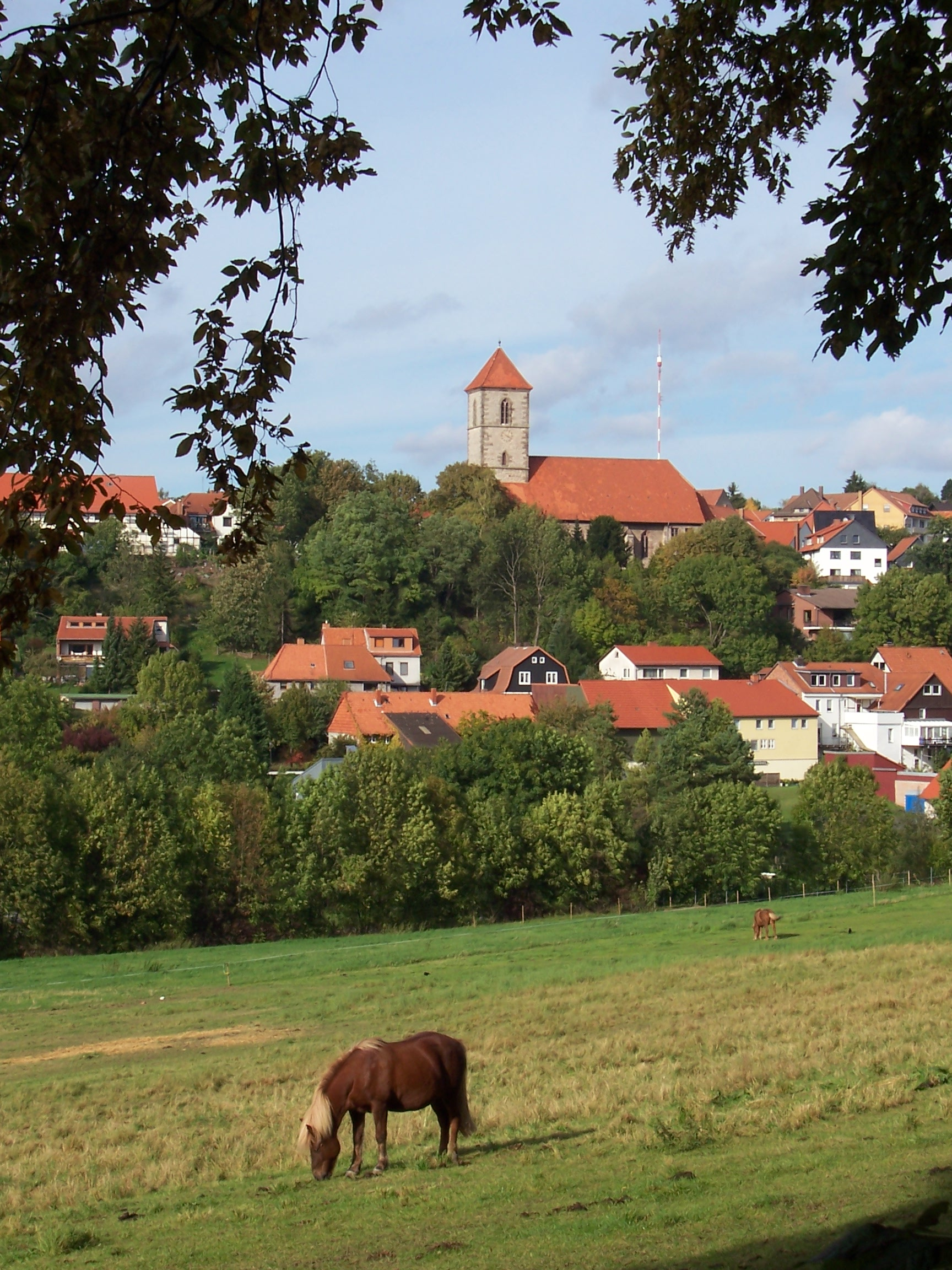 Die Klosterkirche Nikolausberg (Göttingen)